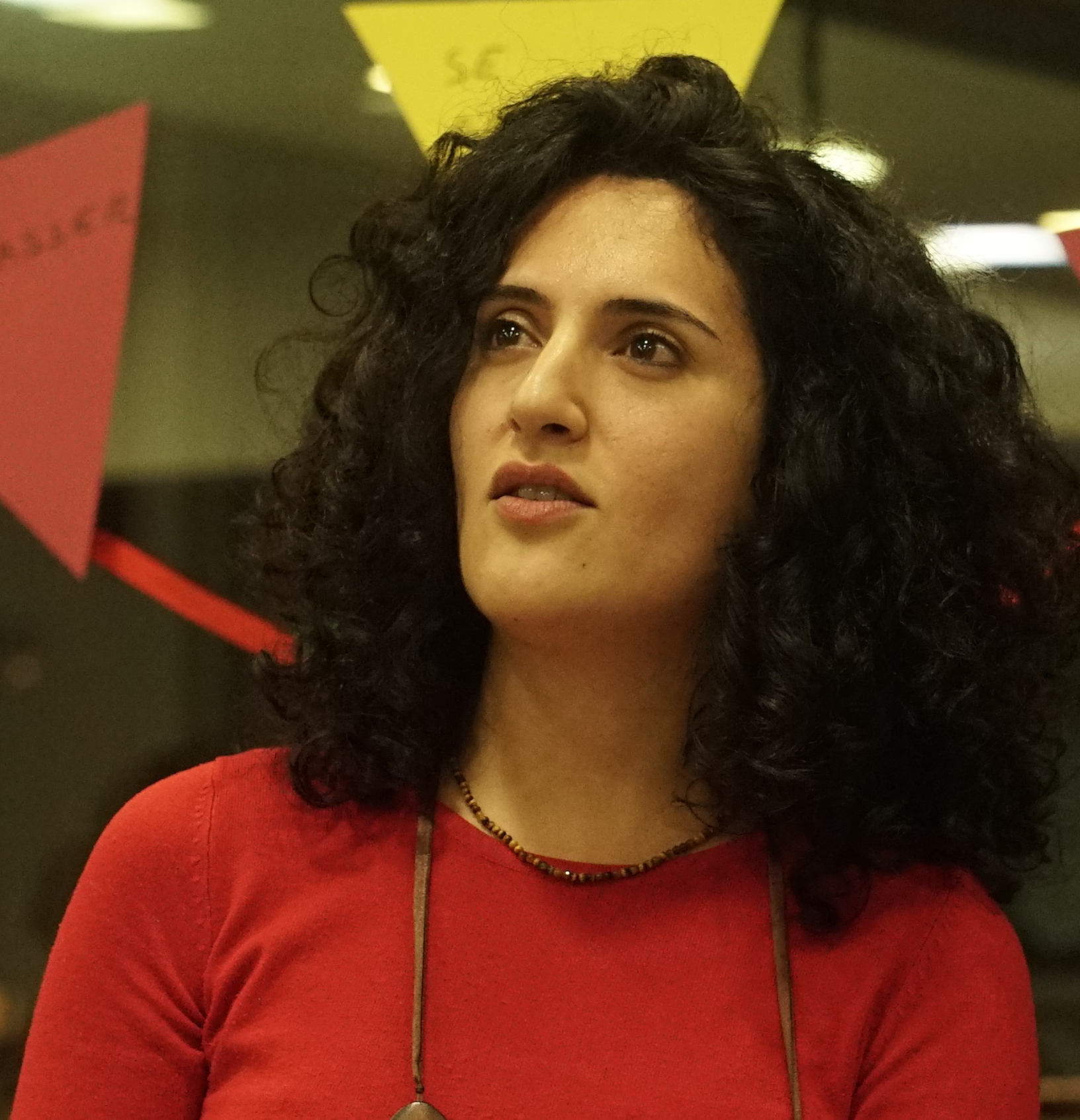 lors d'un scance de lecture à la médiathèque de Cormontreuil.